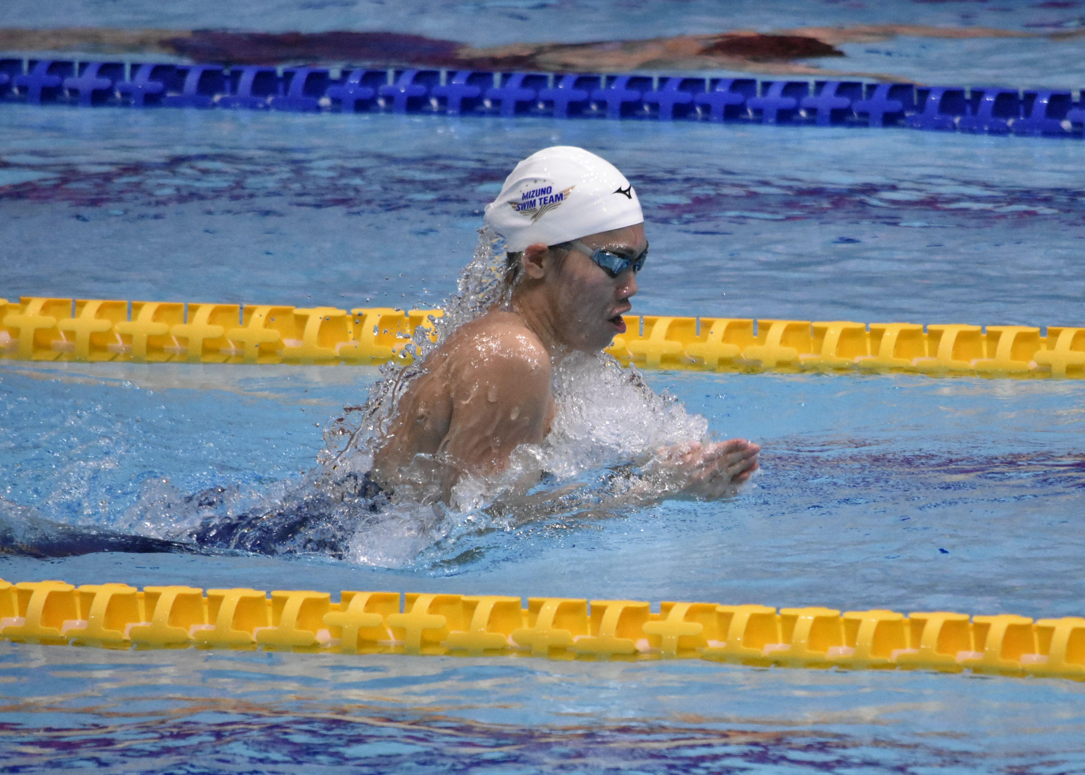 青木 玲緒樹